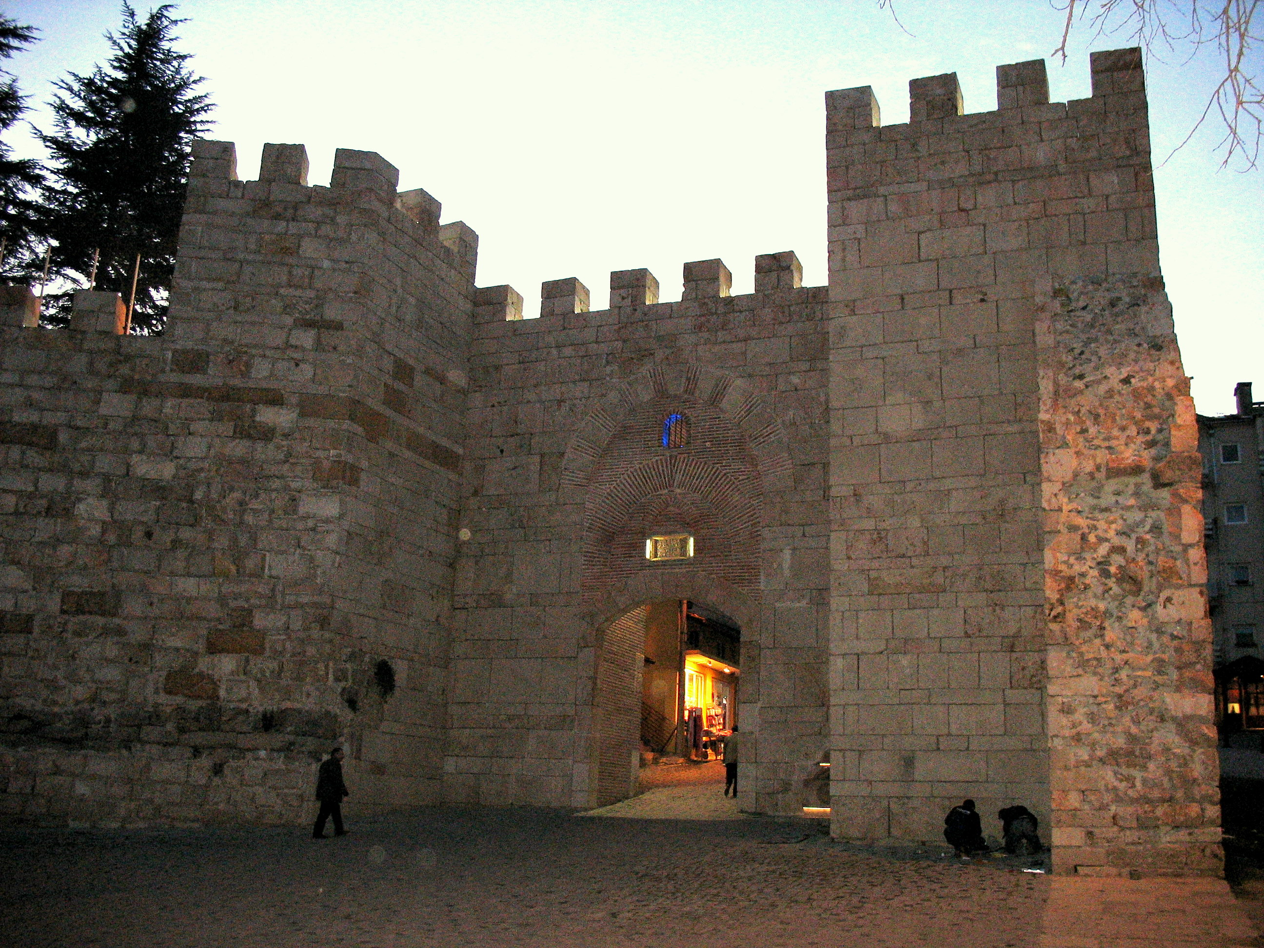 Bursa Kalesi, Tophane